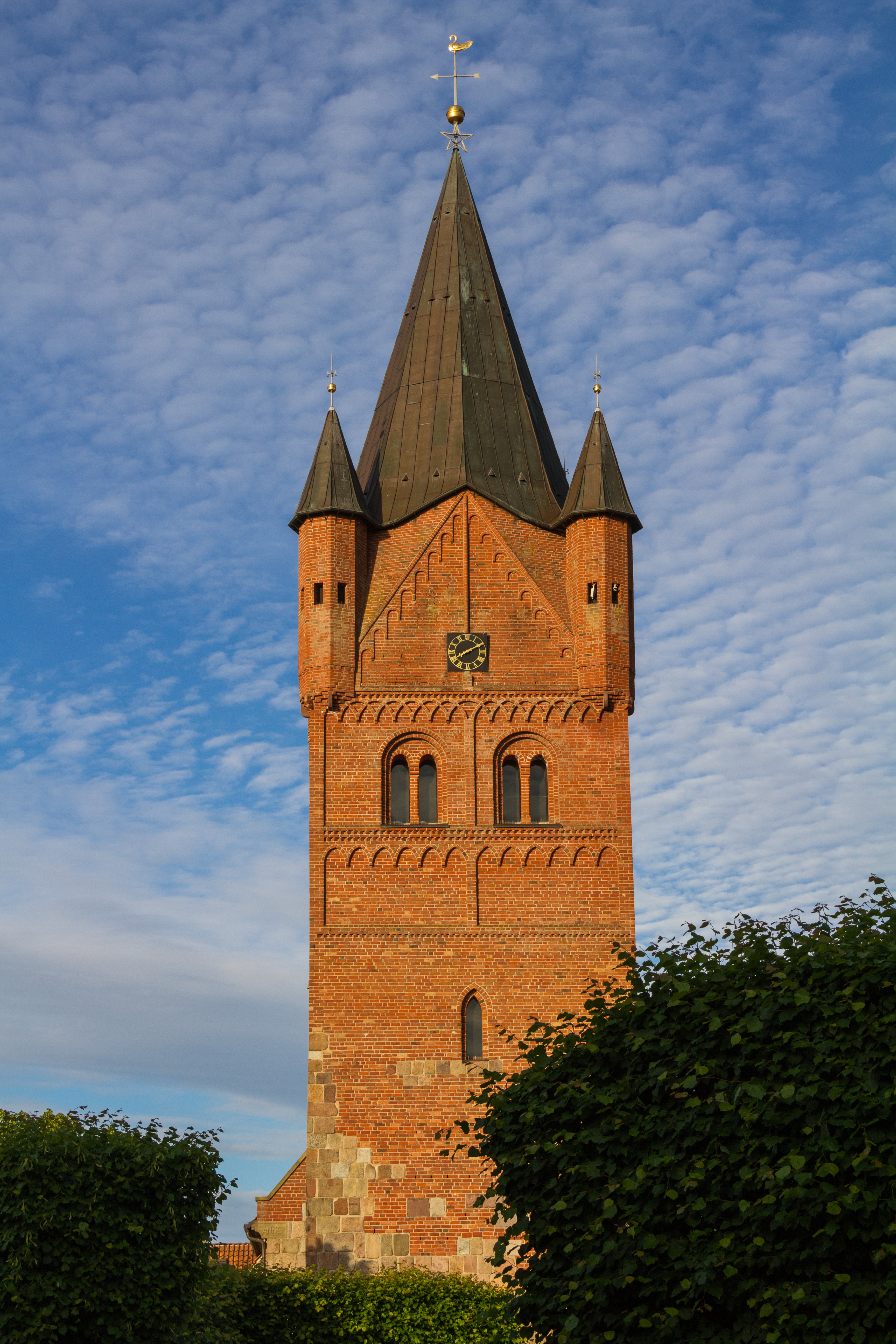 Turm der St.-Petri-Kirche in Westerstede